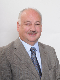 Guillermo Teillier, diputado chileno.